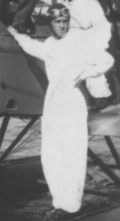 Il Comandante Istruttore Nello Valzania con tuta bianca ed occhiali in piedi sullo scafo del velivolo Caproni CA 100 idro